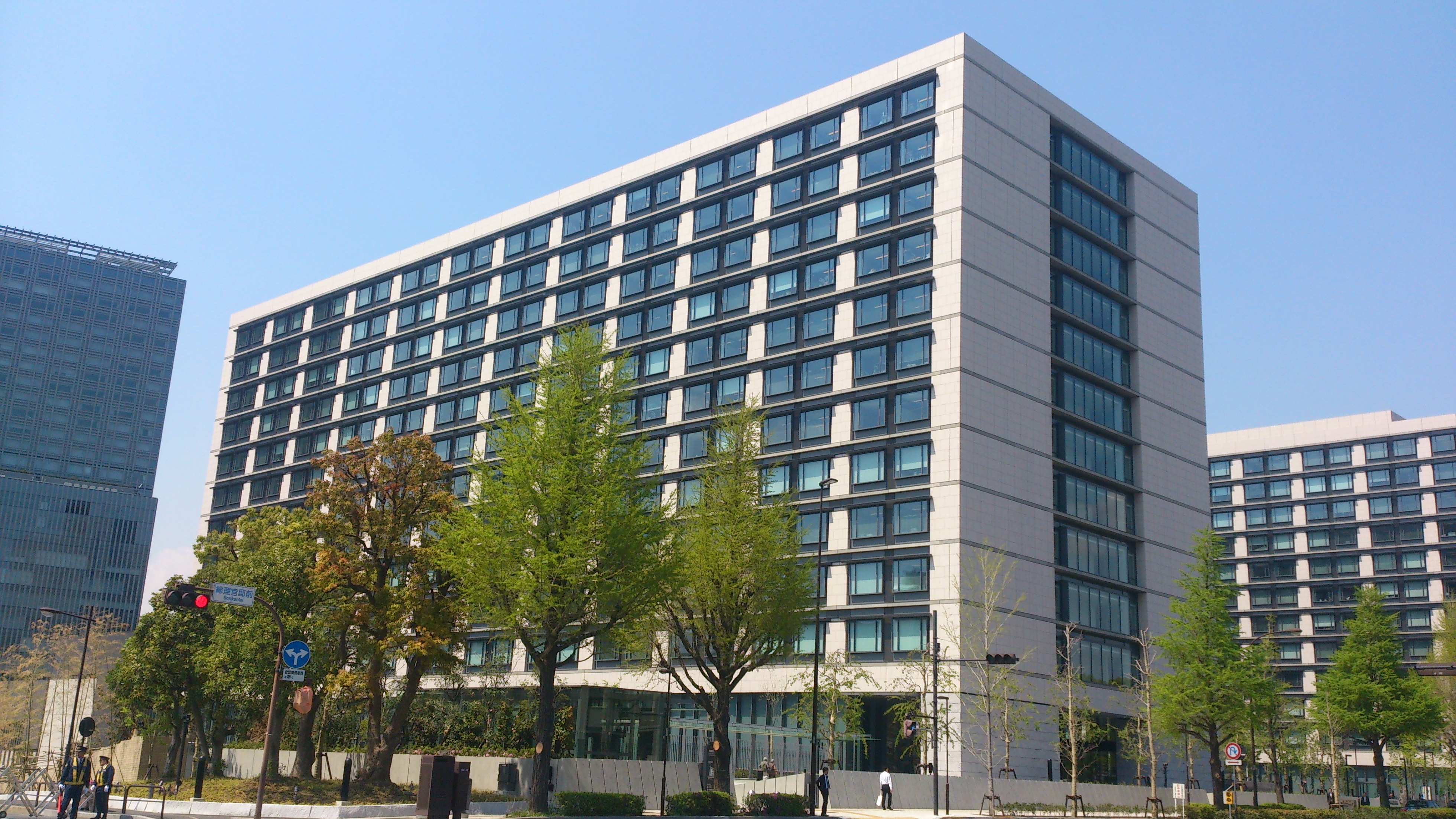 新衆議院第一議員会館の全景。